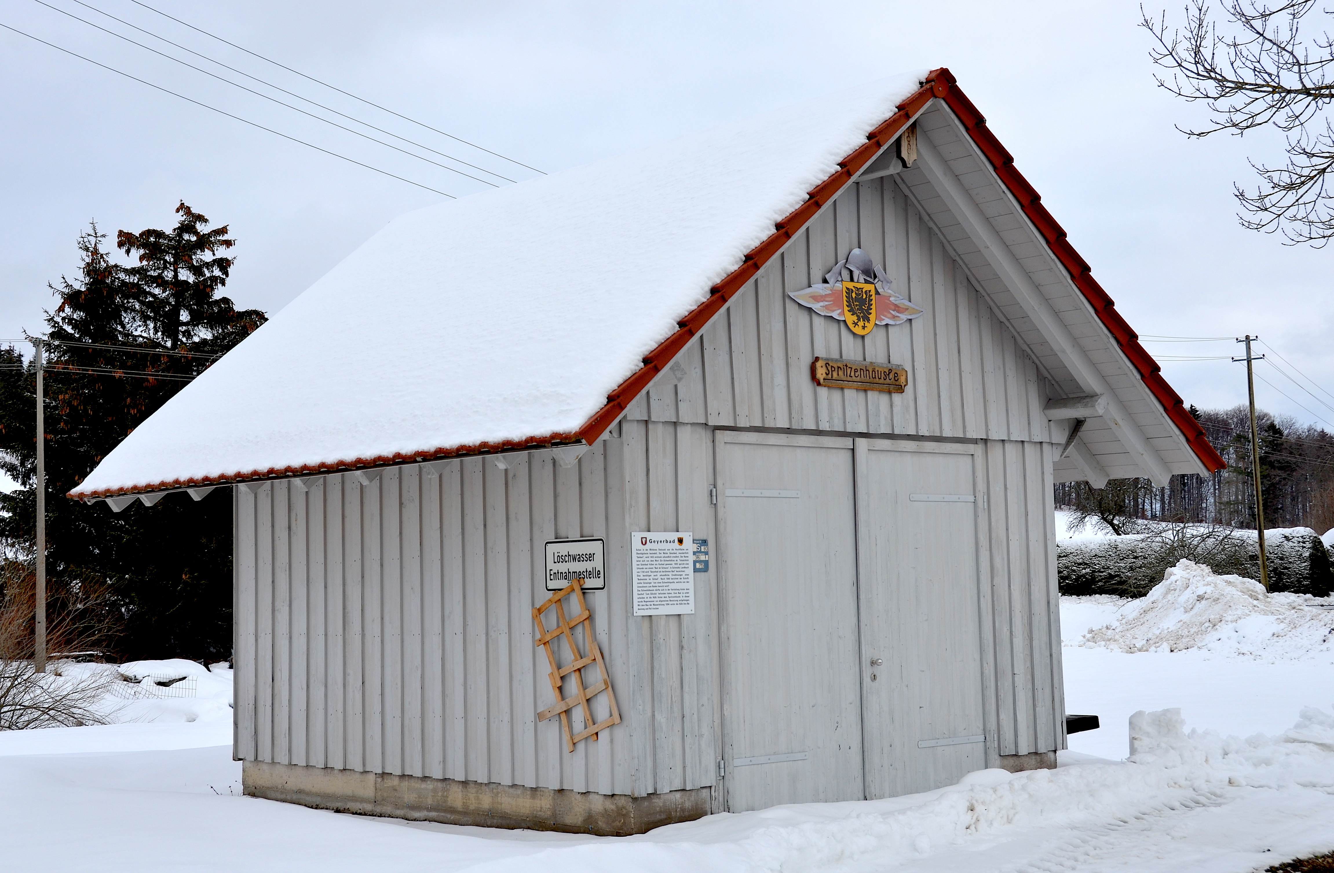 Spritzenhäusle in Geyerbad, Germany (2019)